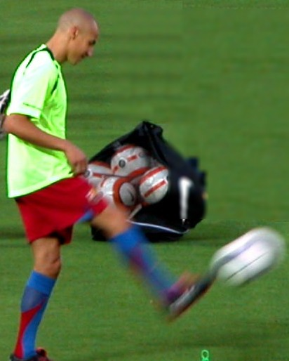 Larsson